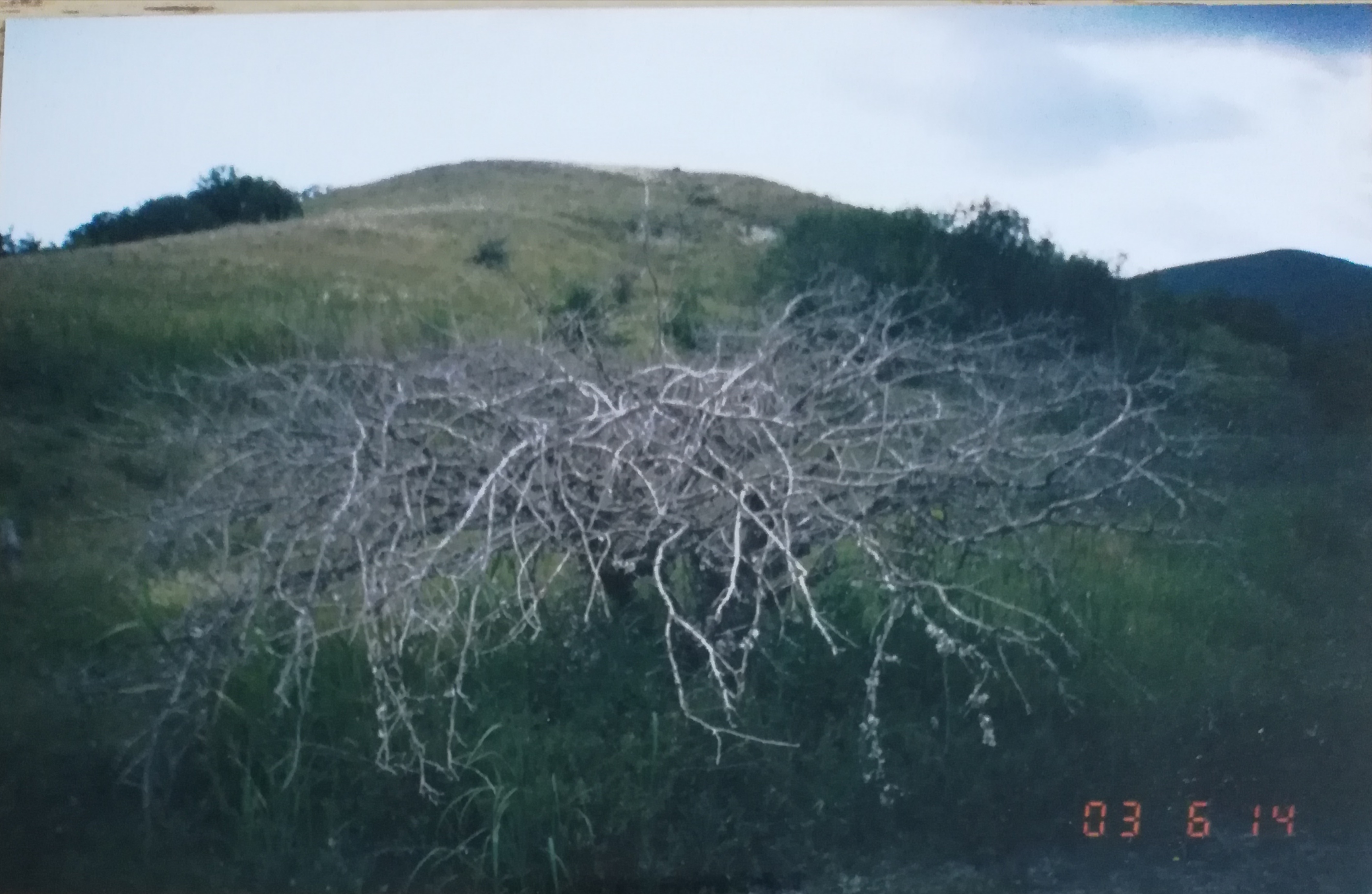 Дерево на берегу высохшего водоёма